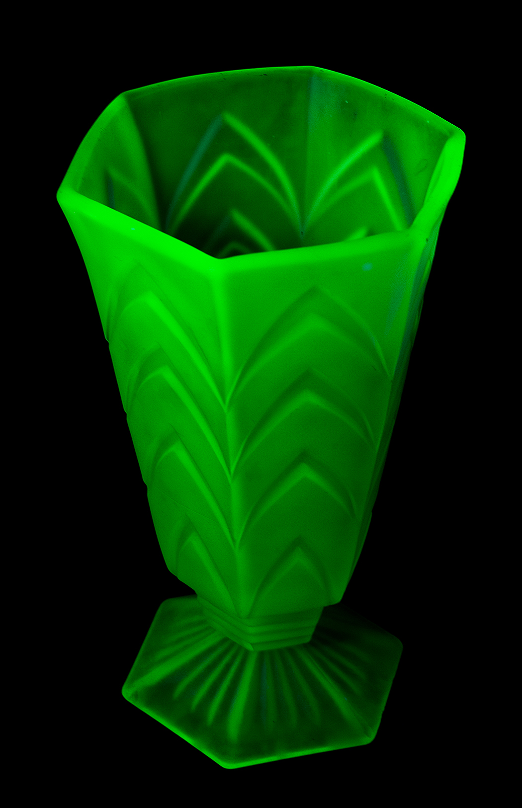 Fluorescent Uranium Depression Glass